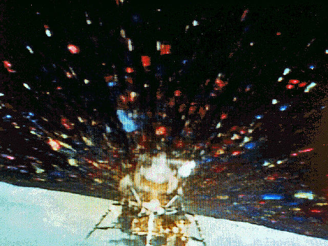 Apollo 16: décollage du Lem de la surface lunaire. Source: NASA